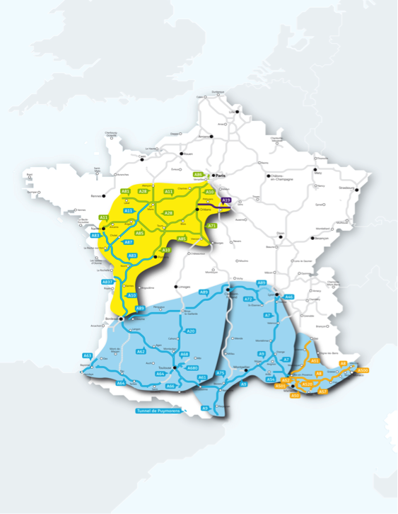 Carte de France avec les zones de diffusion de Radio VINCI Autoroutes